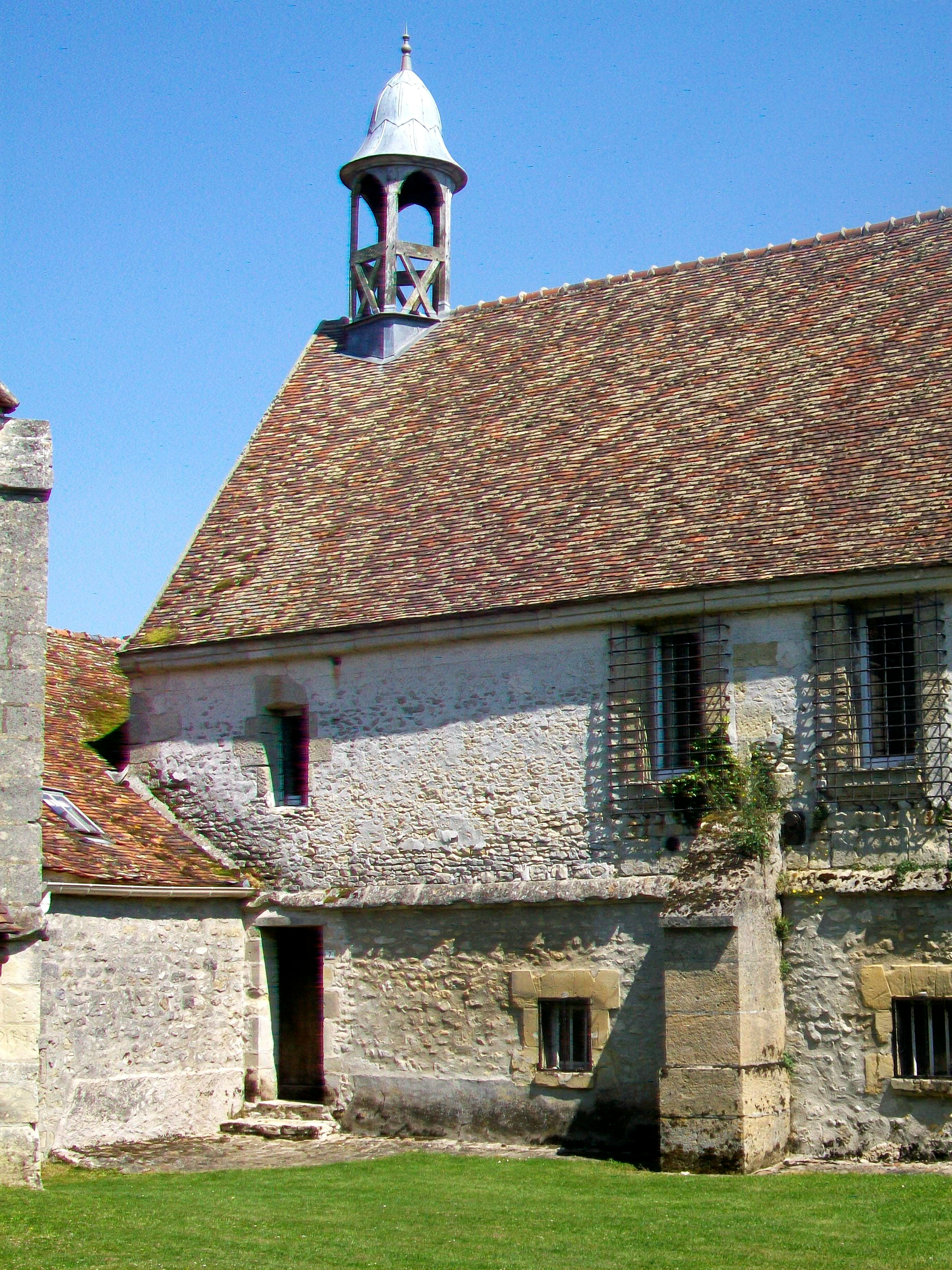 L'ancien prieuré à côté de l'église, rue Octave-de-Boury.